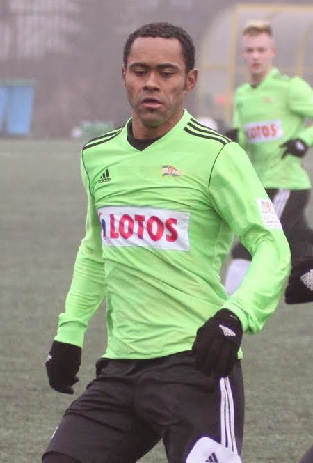 Deleu w barwach Lechii Gdańsk